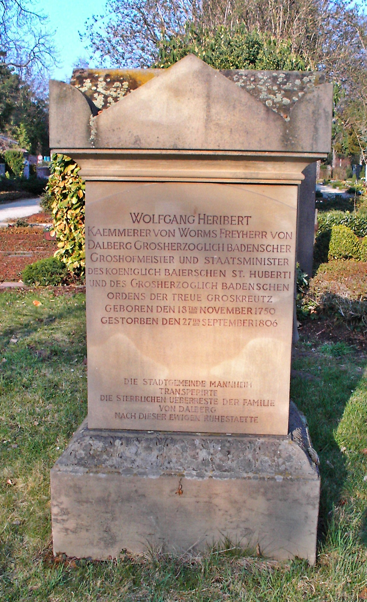 Grabstein Wolfgang Heribert von Dalberg, Hauptfriedhof Mannheim